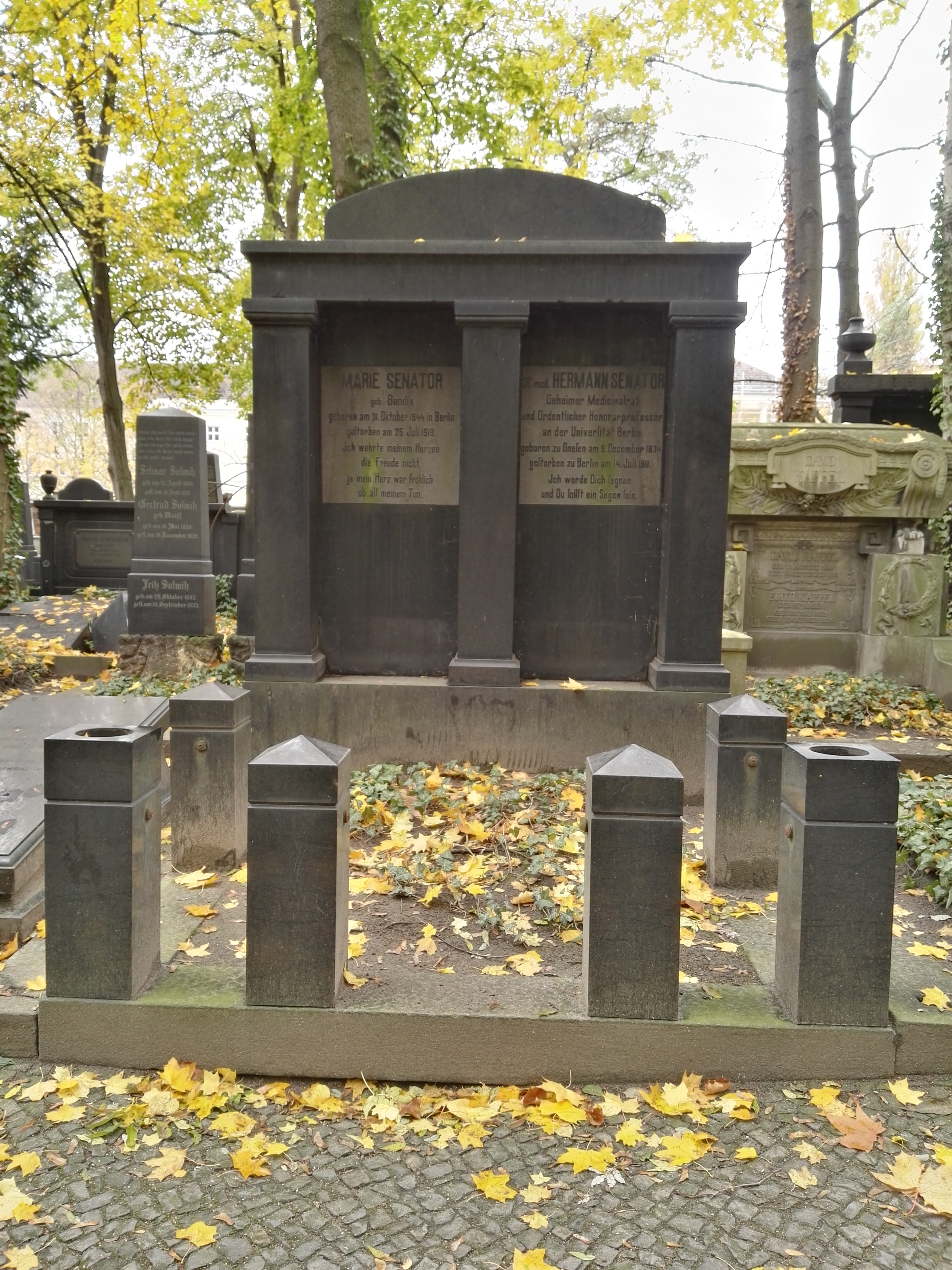 Grab von Hermann Senator auf dem Jüdischer Friedhof Schönhauser Allee in Berlin-Prenzlauer Berg